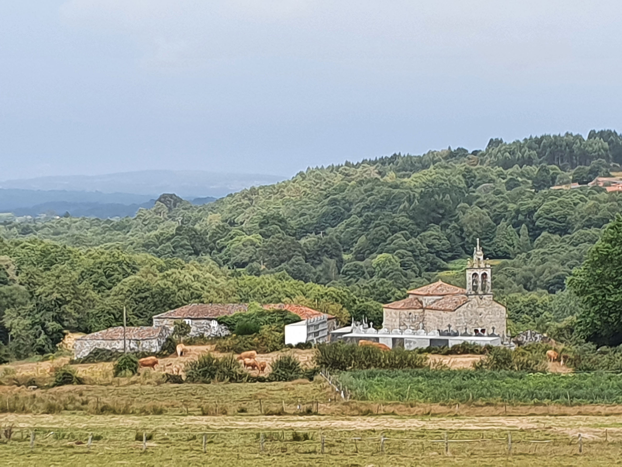 Lugar da Eirexe, na parroquia de Facha. Conxunto de edificacións construídas arredor da Igrexa parroquial, entre as que se atopa a casa reitoral. Na actualidade todas está deshabitadas e en estado ruinoso.